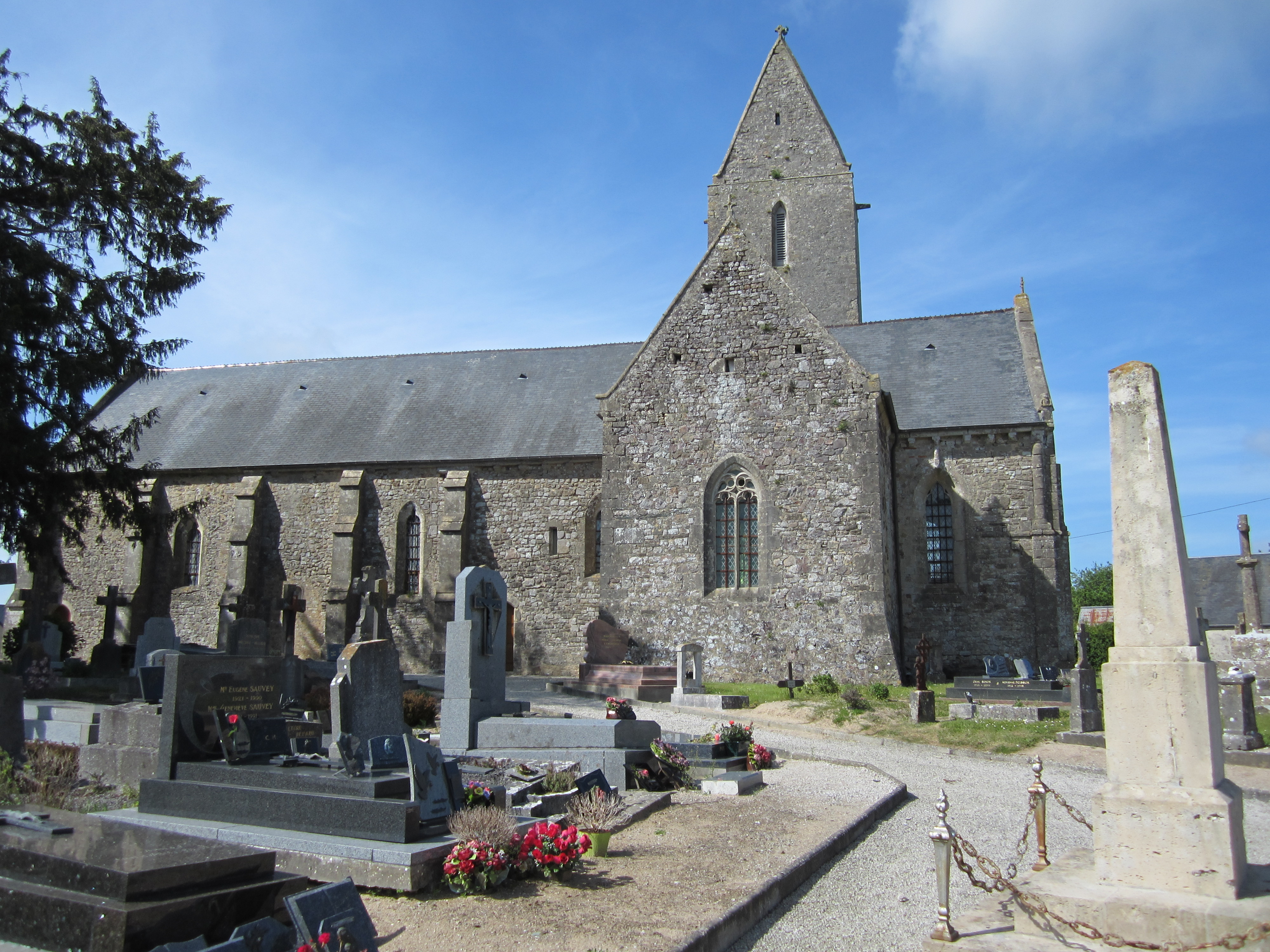 Église Notre-Dame de Sortosville-Bocage .